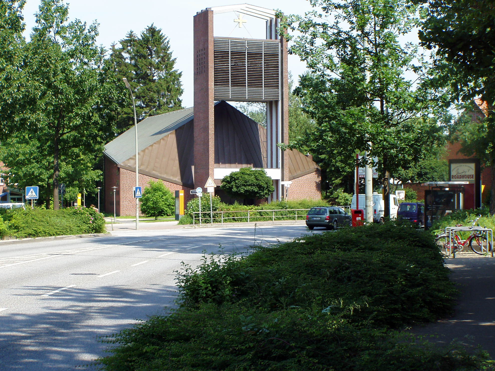 Vicelin church at Saseler Markt, Hamburg-Sasel, Germany